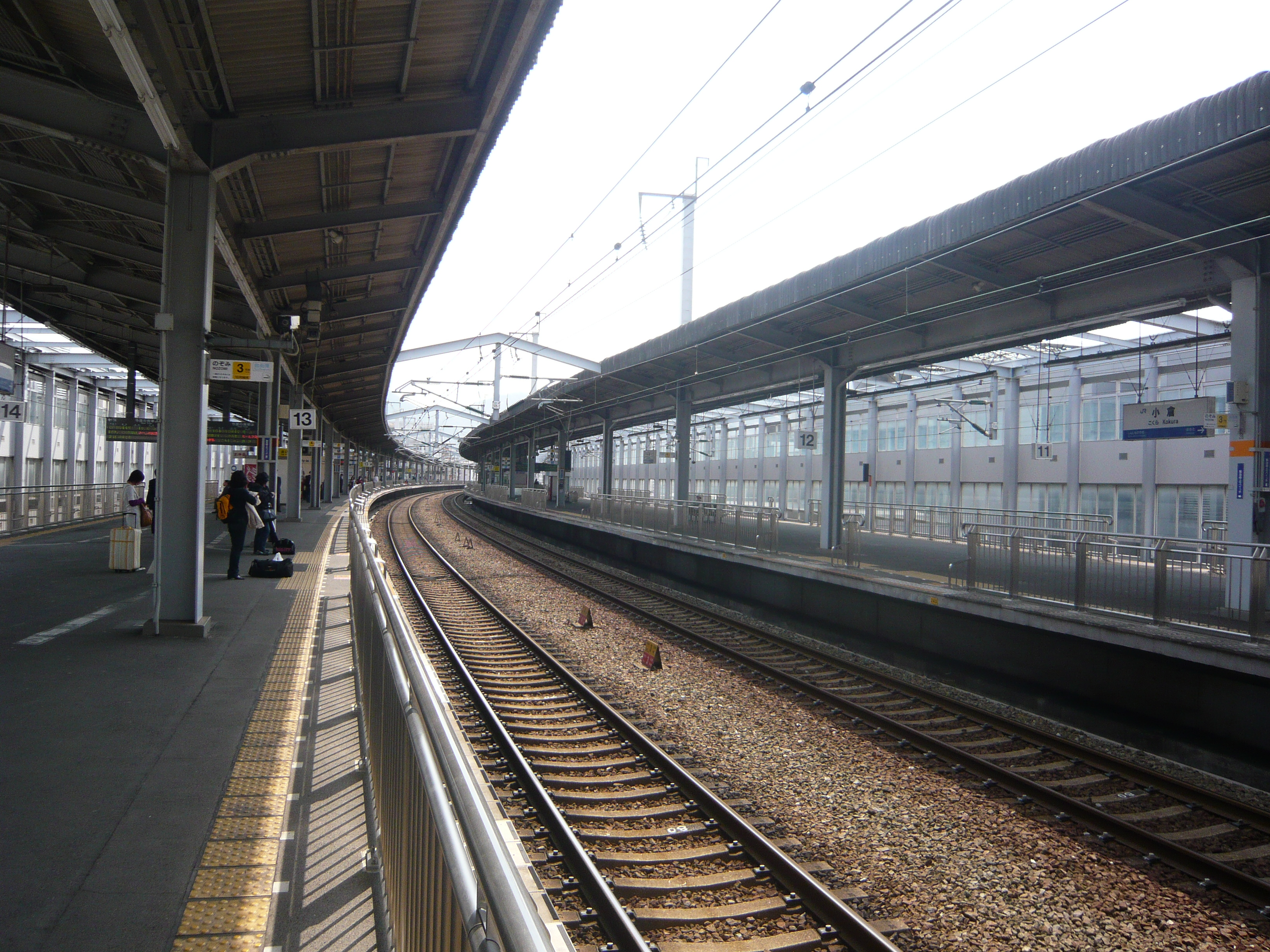 Kokura Station 新幹線ホームw:ja:小倉駅 (福岡県),Kitakyushu,Fukuoka,Japan（福岡県北九州市）で撮影。